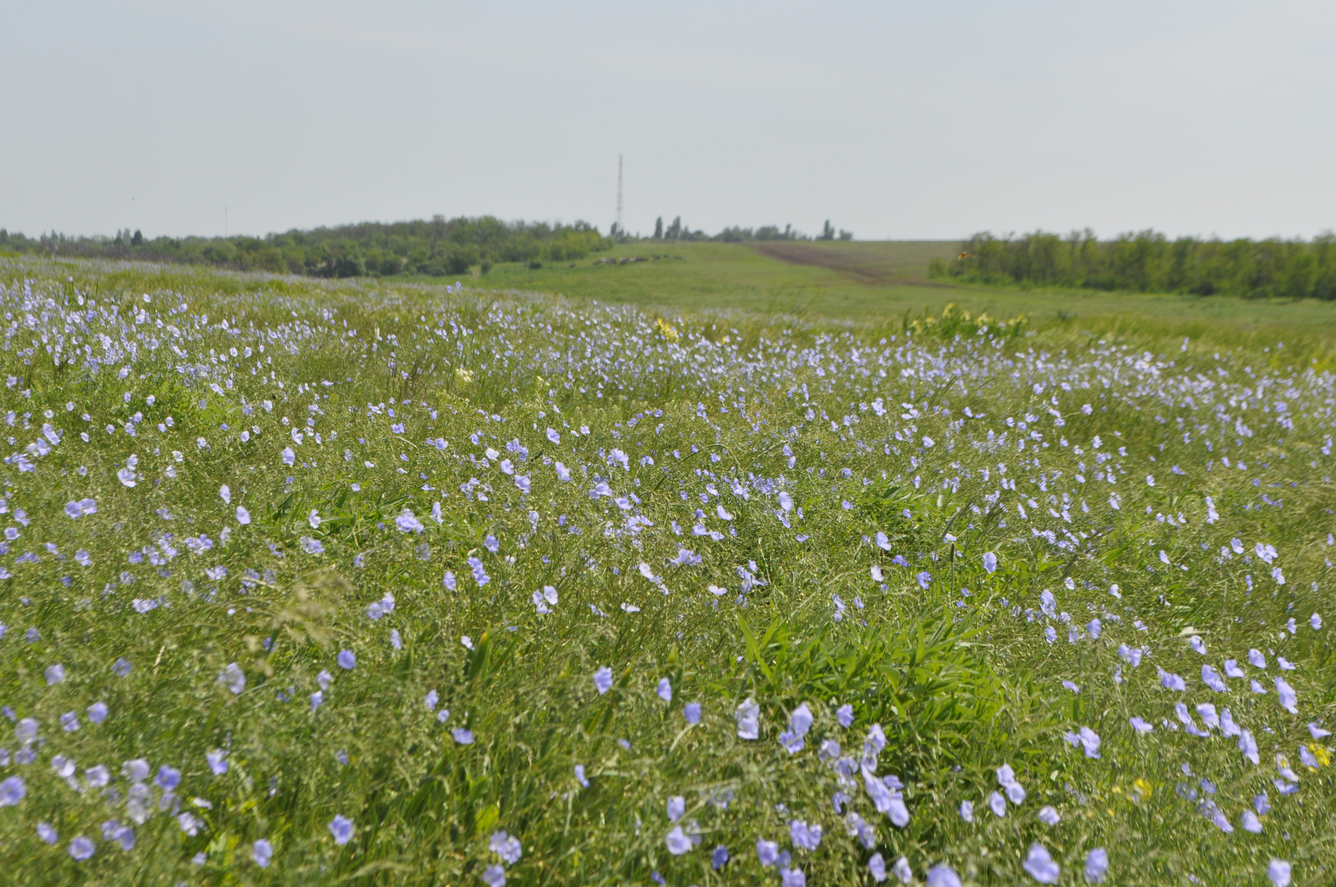 Березово-Вишневський, Покровський р-н, с. Березове та Вишневе